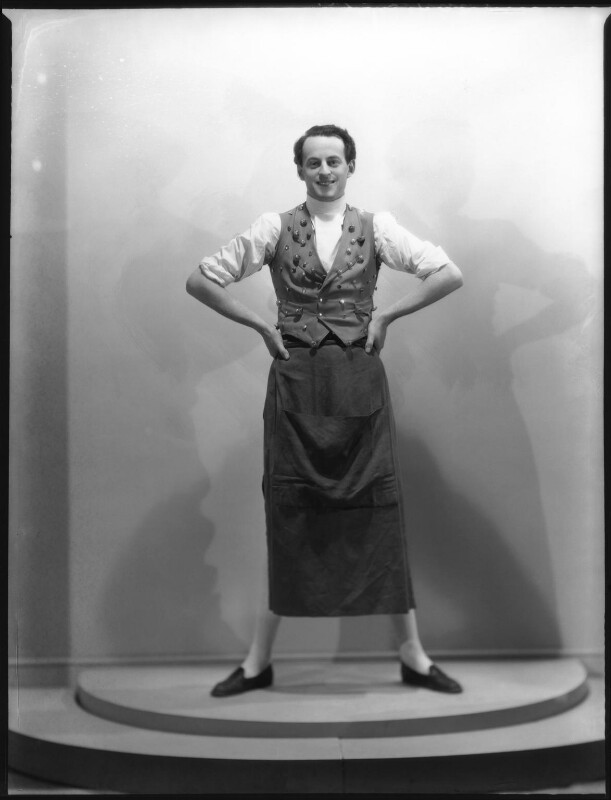 Hon. David Herbert, 14 février 1940